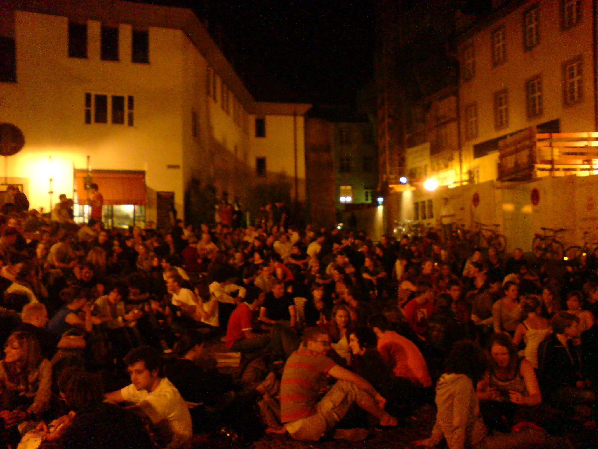 Augustinerplatz in Freiburg bei Nacht